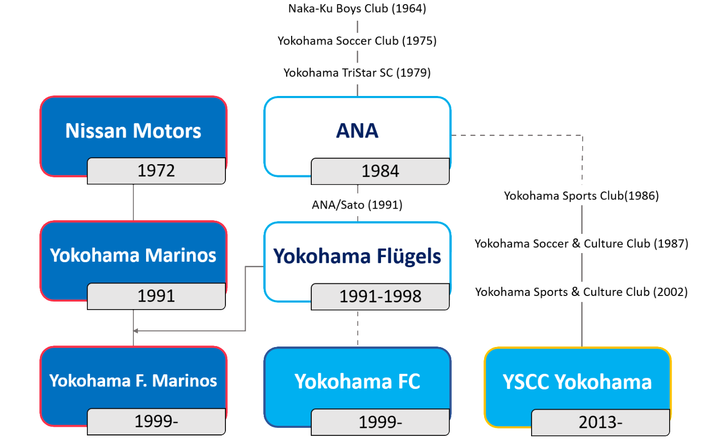 横浜のサッカークラブ